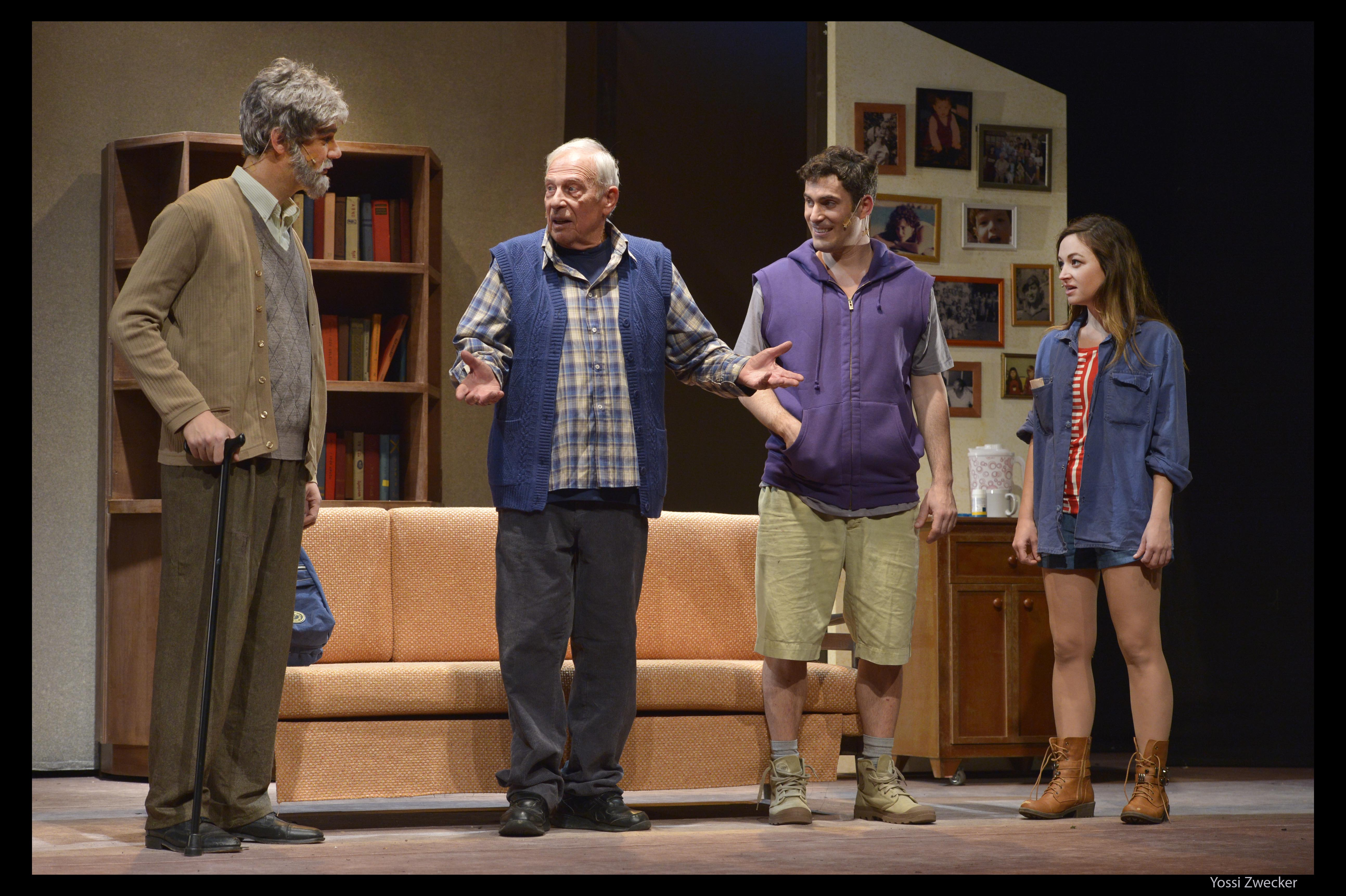 מימין: נלי תגר, אודי פרסי, אלכס פלג ויואב דונט בהצגה "הבחירה" של תיאטרון אורנה פורת לילדים ולנוער.